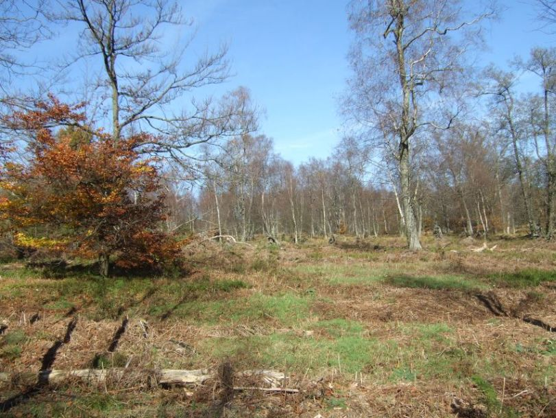 Hochmoor Knüppeldamm